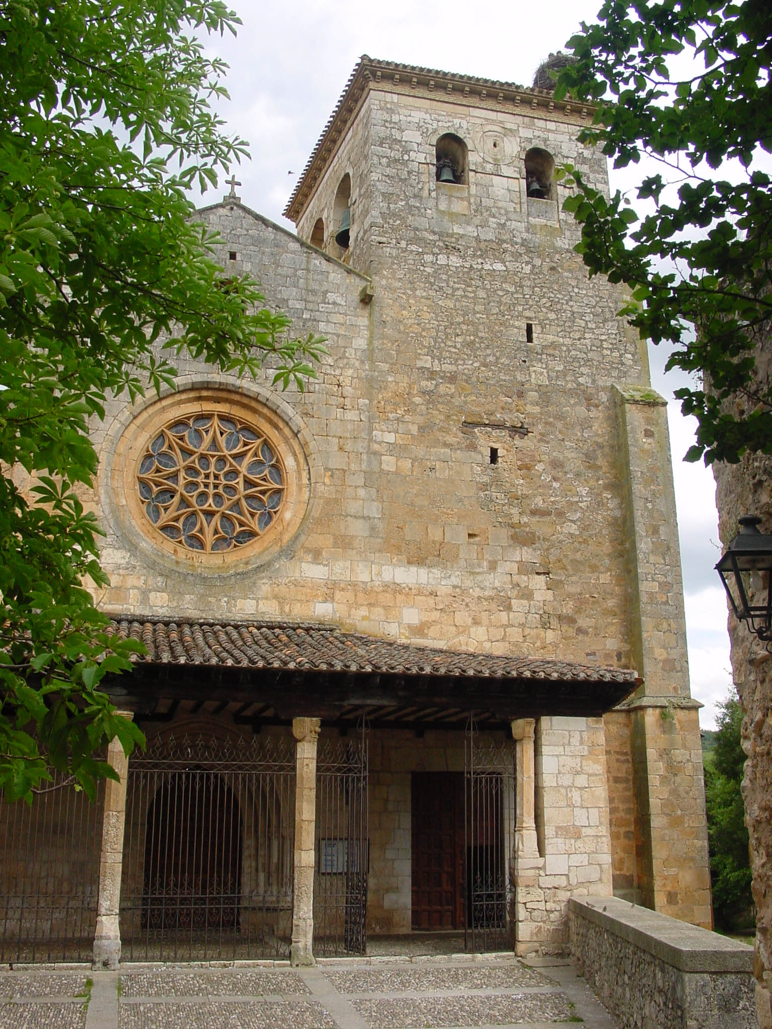 Colegiata de San Cosme y San Damián de Covarrubias (Burgos, España). Es un edificio tardogótico, cuyas obras empezaron en 1474 por encargo del abad Diego Fernández, capellán del rey Enrique IV. De elegantes proporciones y planta de cruz latina, con tres naves y crucero, acoge entre sus muros los panteones de numerosas familias ilustres de la villa. En la imagen, parte del atrio de entrada y torre.